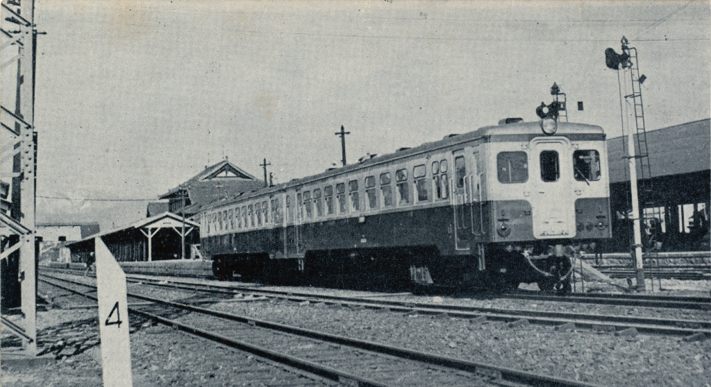 国鉄山陰本線二条駅付近を走行するキハ45500形気動車。